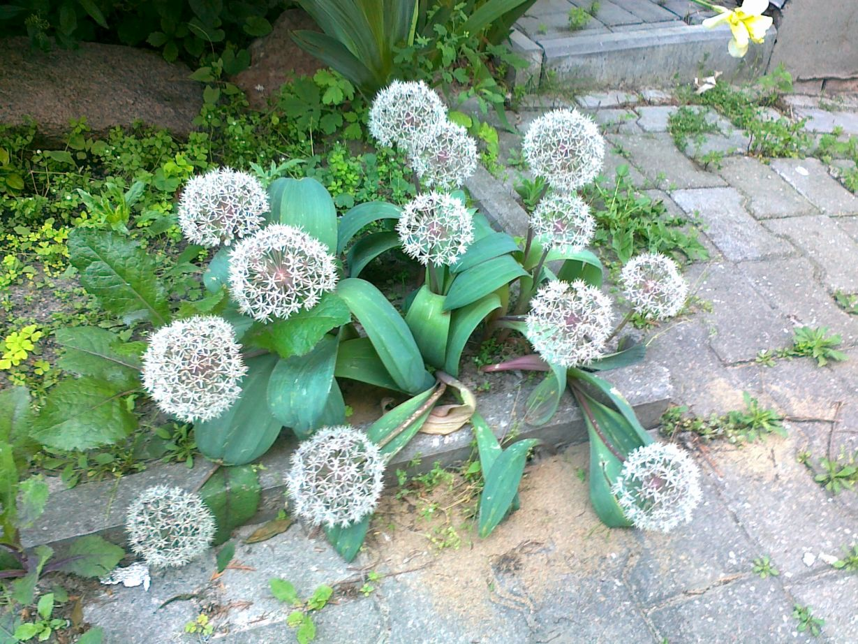 Czosnek karatawski - zdjęcie wykonane w Polsce, w Lublinie, przy ul. Wysockiego